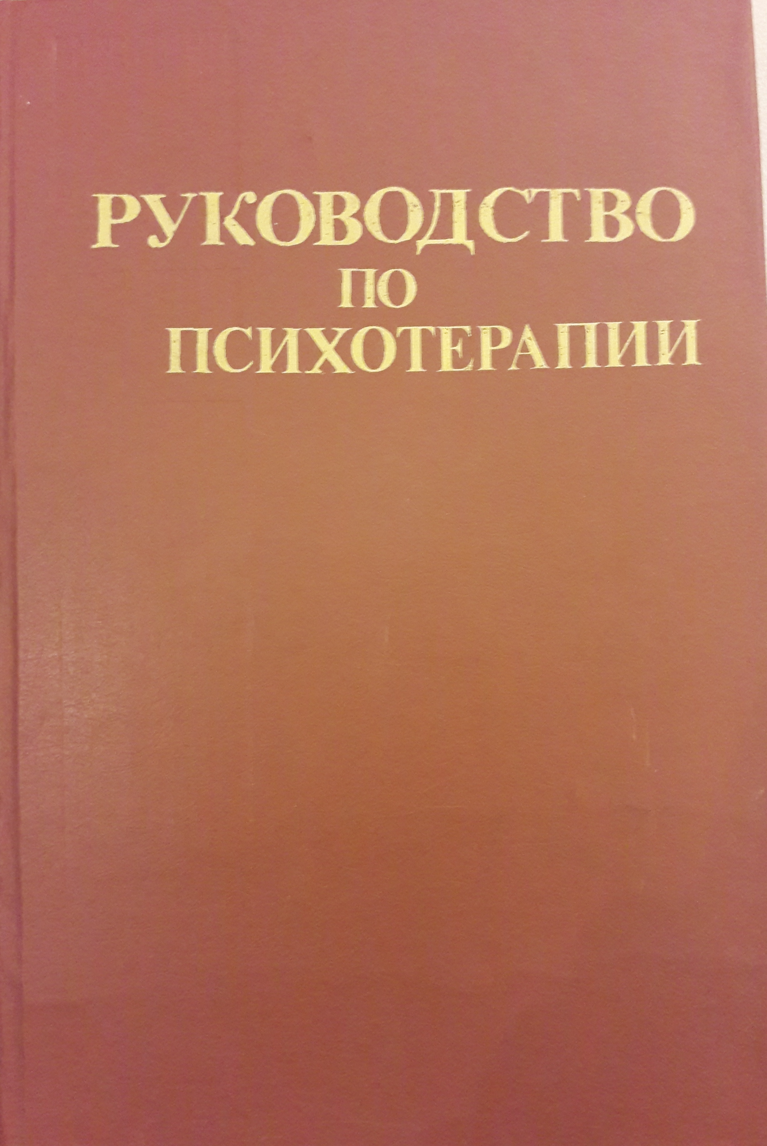 Руководство по психотерапии / [В. Е. Рожнов и др.] ; Под ред. [и с предисл.] В. Е. Рожнова. - 3-е изд., доп. и перераб. - Ташкент : Медицина, 1985. - 719, [1] с.